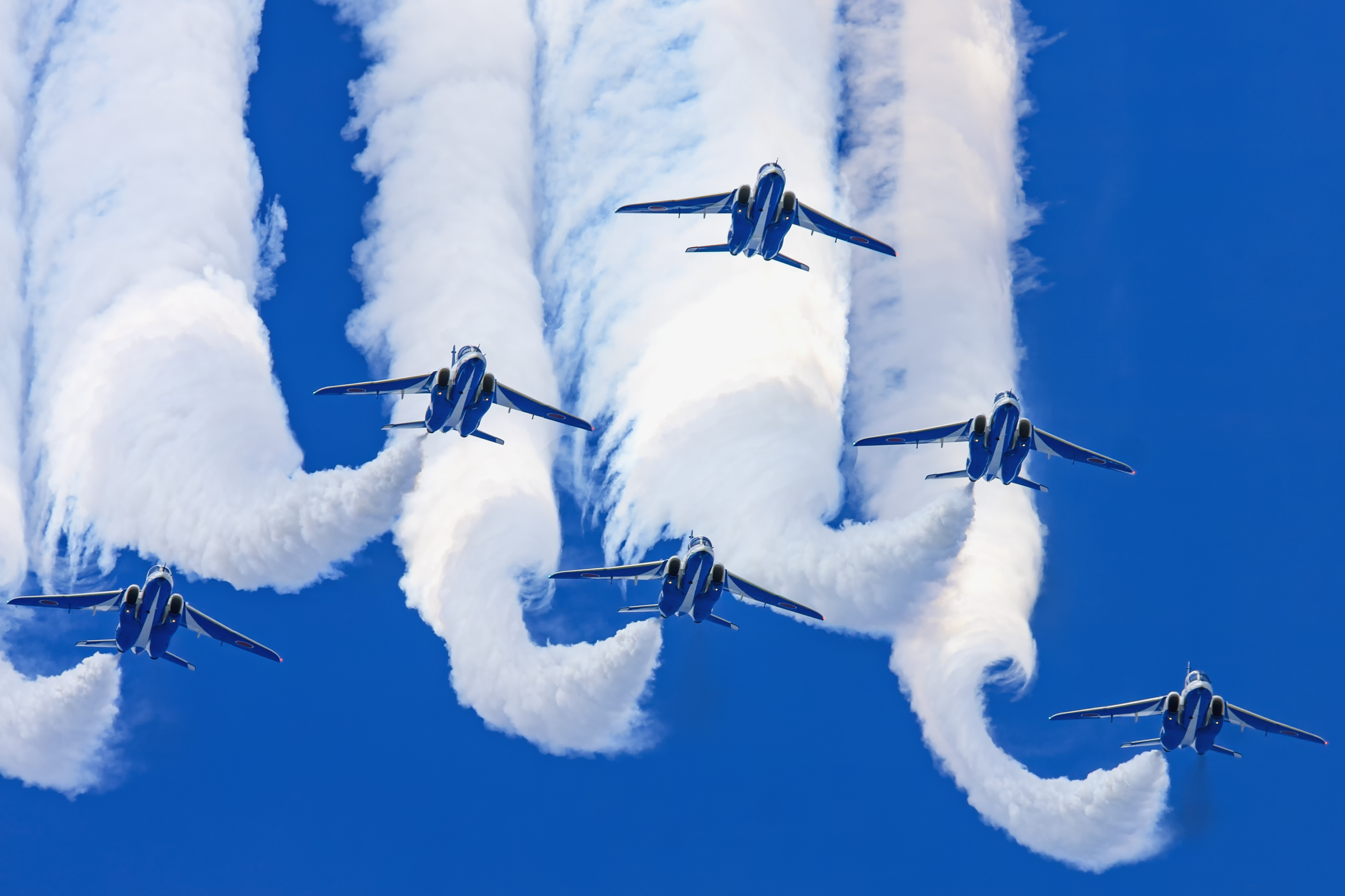 航空自衛隊百里基地航空祭で撮影された、 第11飛行隊ブルーインパルスのT-4 練習機による、ワイド・トゥ・デルタ・ループ